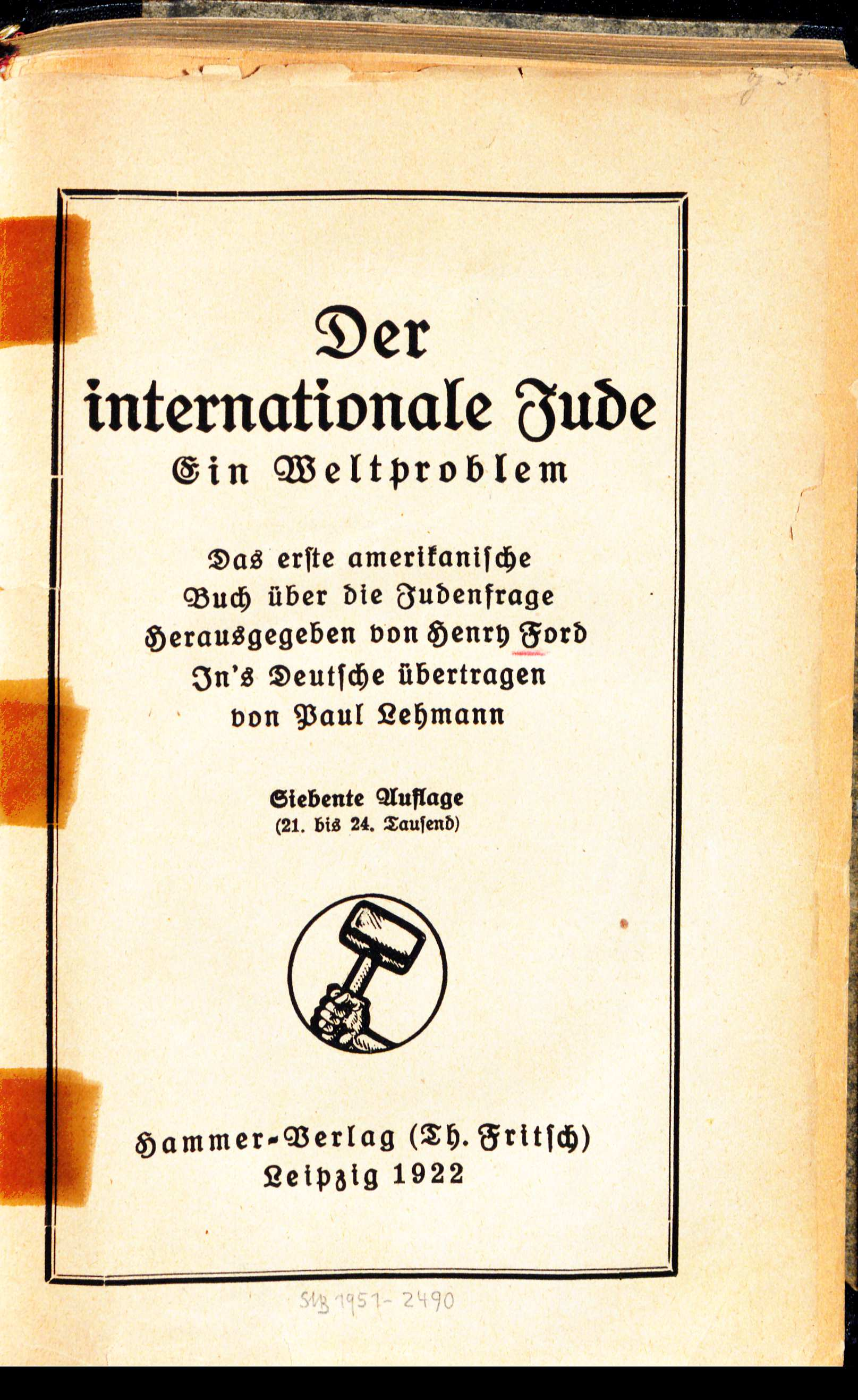 Henry Ford (Hrsg.): Der internationale Jude Band 1 1922